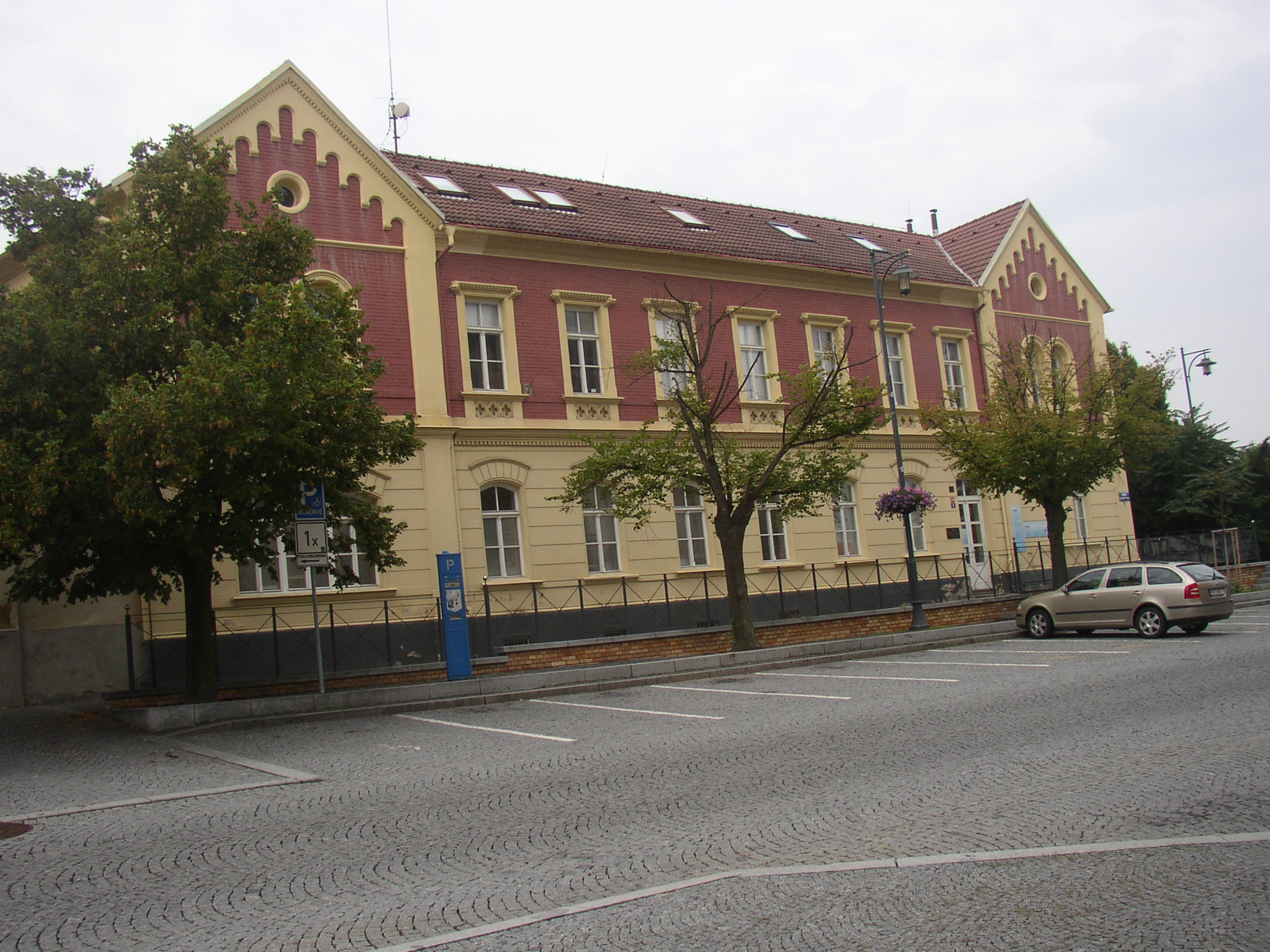 Novorománská budova velkostatku z roku 1898, nám. Starosty Pavla čp. 1464, Kladno.